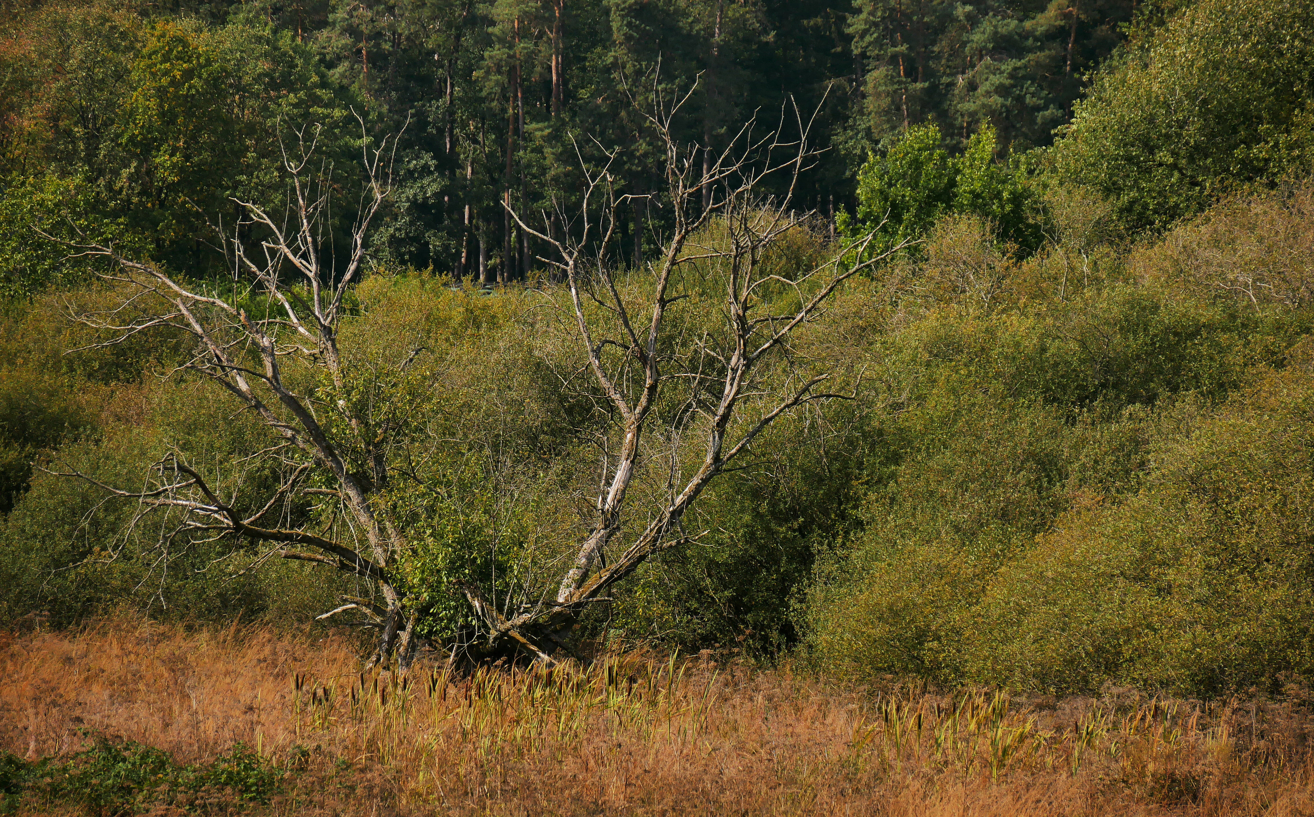 Naturschutzgebiet Eidenbruch bei Gusenburg - Rohrkolben im Süden und abgestorbener Baum